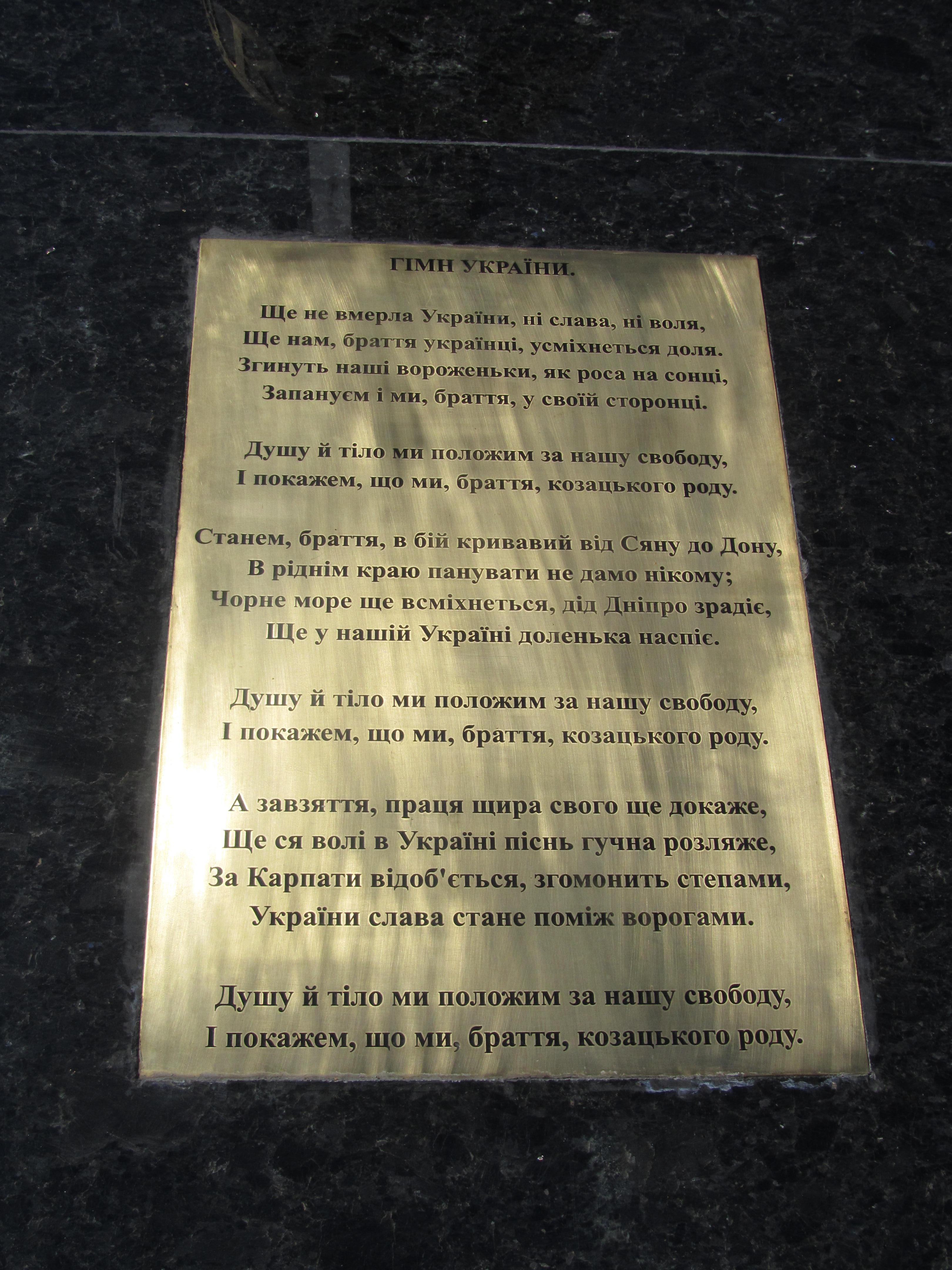 Зміїв, державний прапор України - Гімн України